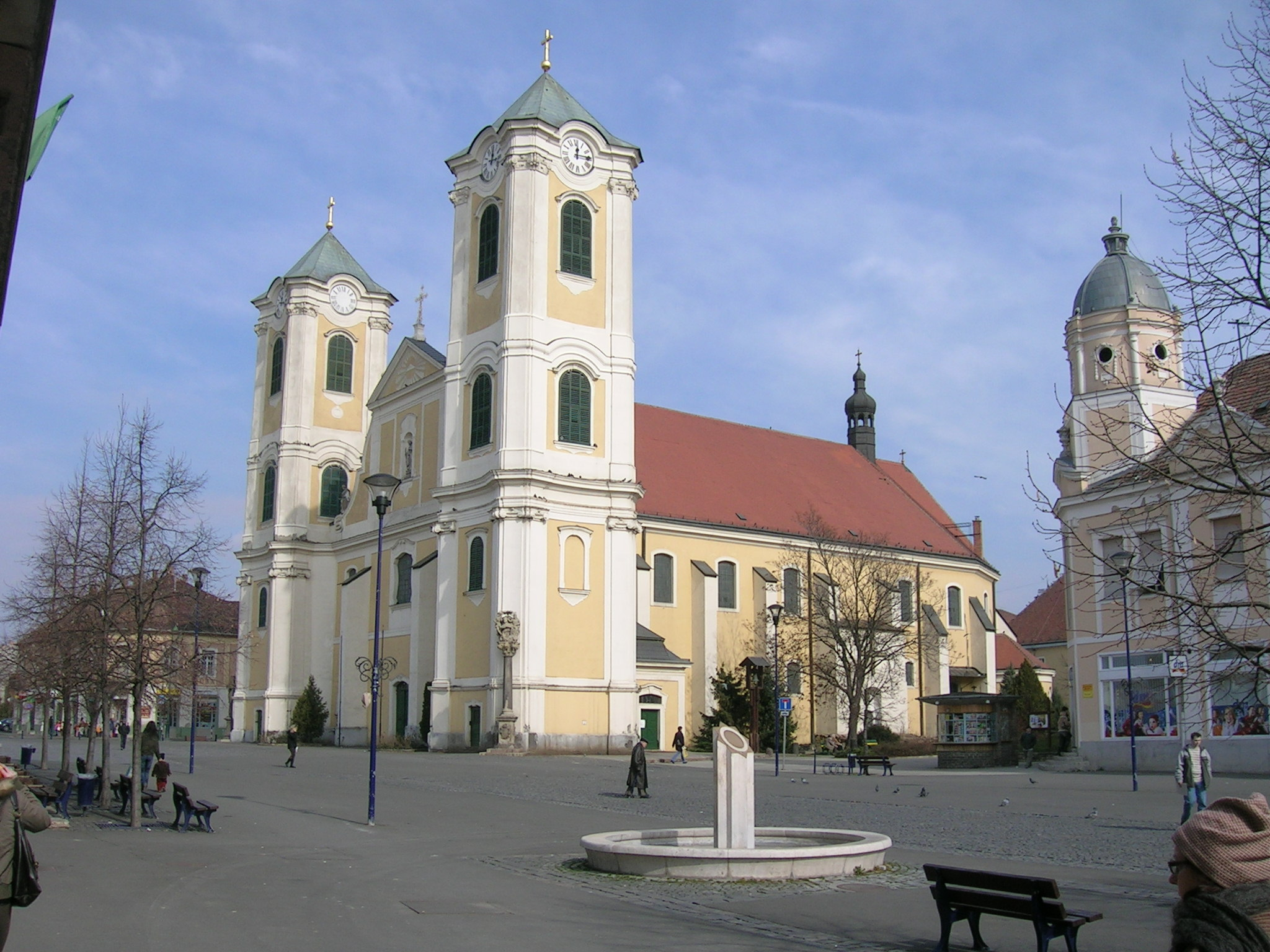 Eglise baroque Szent Bertalan de Gyöngyös.